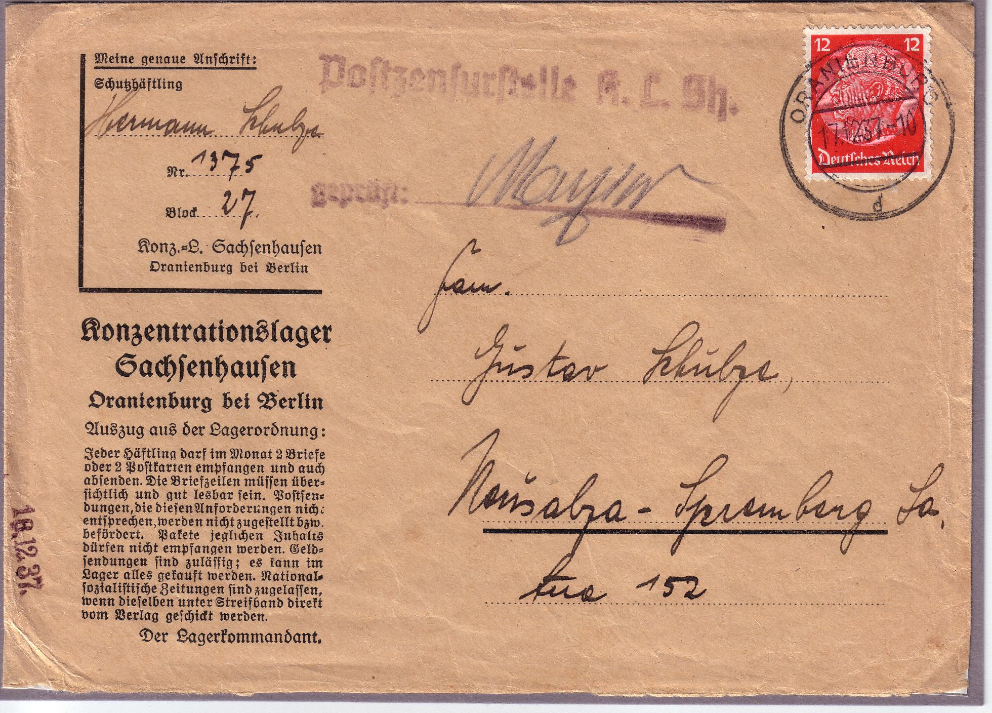 Häftlingsbrief aus dem KZ Sachsenhausen vom Dezember 1937 Poststempel: "Oranienburg, 17.12.1937